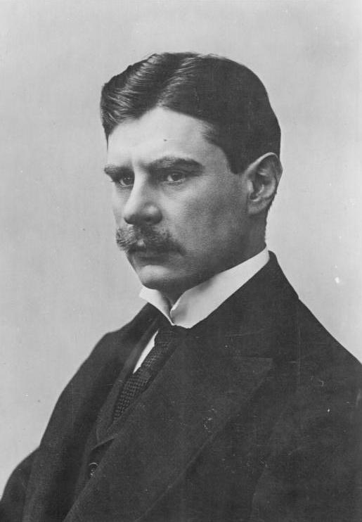 Hans Baluschek Zentralbild 7487-12-Hans Baluschek deutscher Maler und Graphiker geb. 9.5.1870 in Breslau - gest. 28.9.1935 in Berlin. Baluschek war ein Hauptvertreter des deutschen kritischen Realismus; anklagend stelle er das Leben des Proletariats dar. 1933 bekam der Künstler Ausstellungsverbot. (Aufnahme 1912) [Porträt Hans Baluschek] Abgebildete Personen: Baluschek, Hans Prof.: Maler, Grafiker, Deutschland